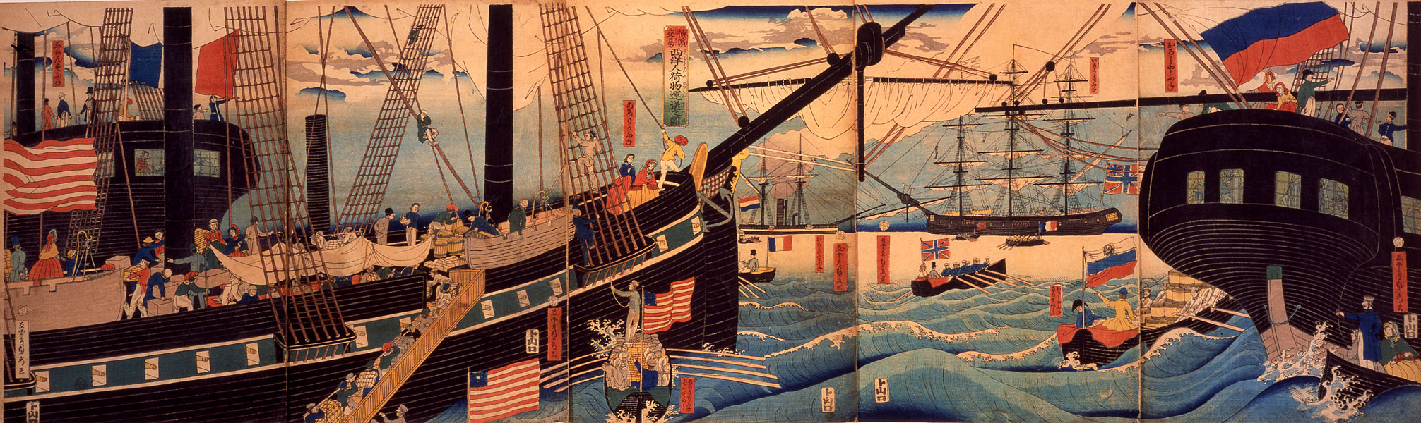 Yokohama trading ships